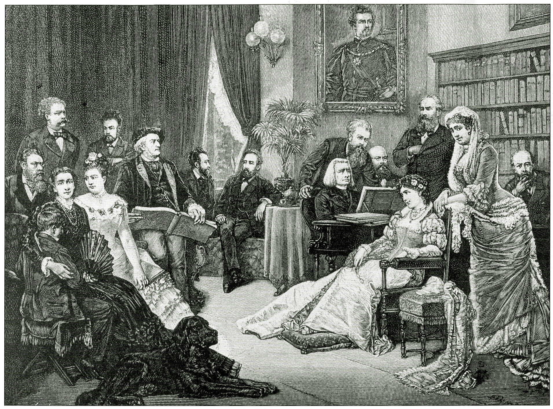 Лист в гостях у Вагнера музицирует в присутствии Германа Леви.